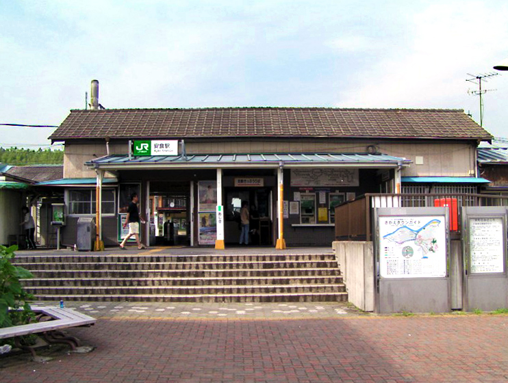 安食駅舎(cropped)